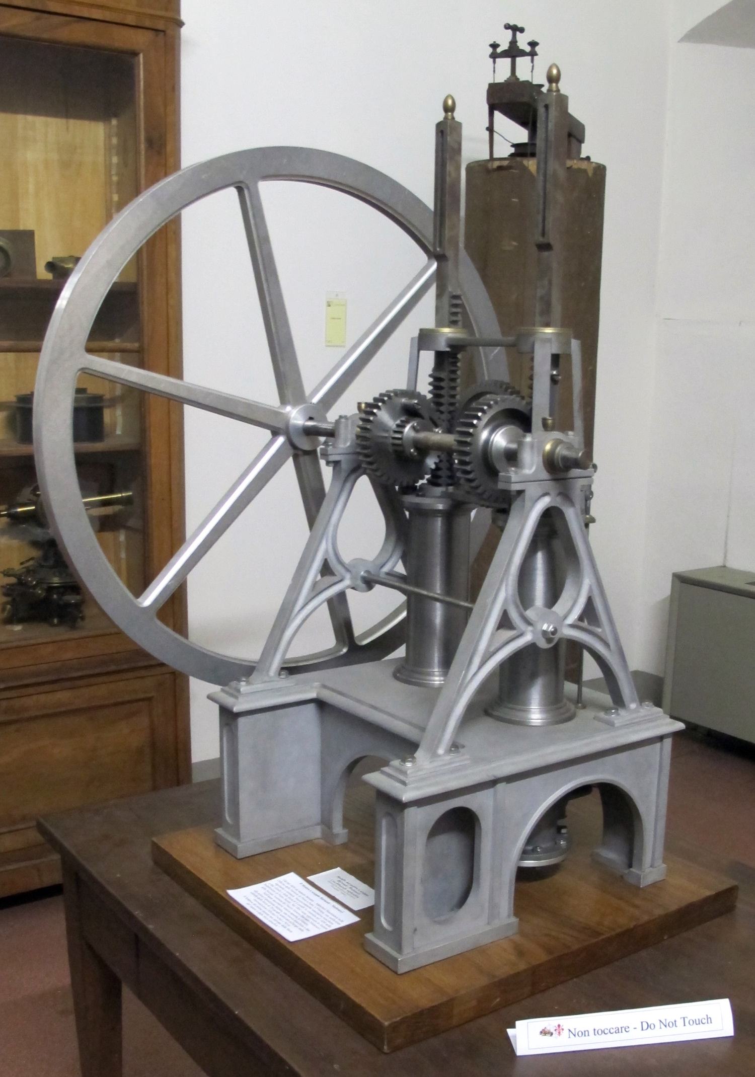 Osservatorio ximeniano, modello del motore a scoppio barsanti-matteucci